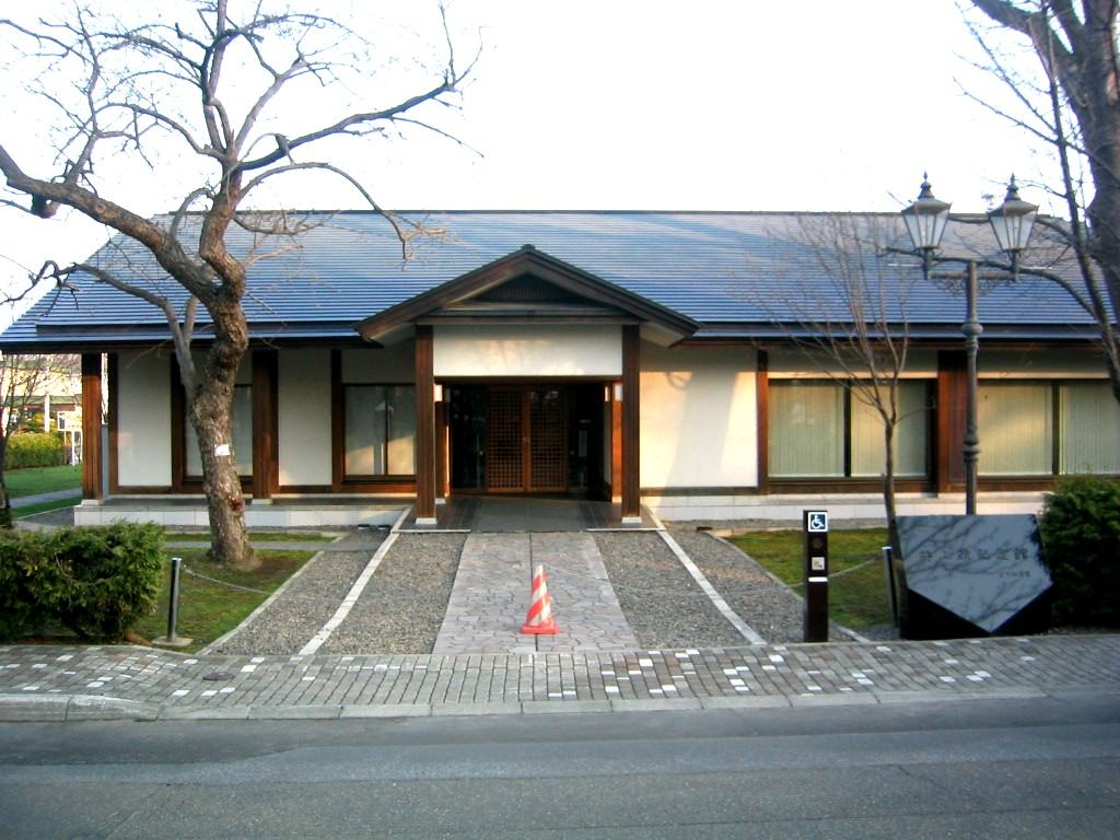 投稿者が撮影 撮影年月日：2010年5月5日 北海道旭川市の井上靖記念館